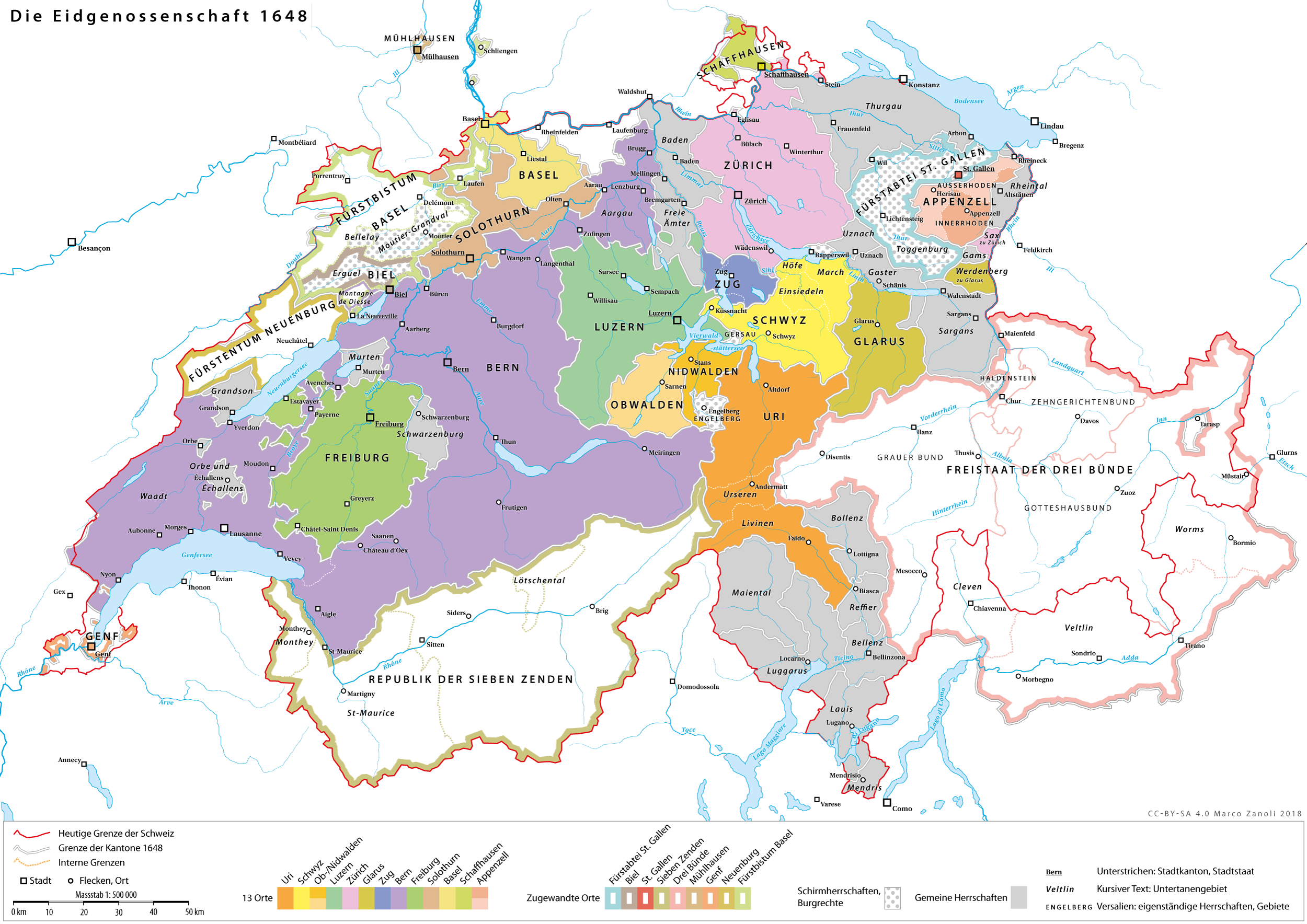 Karte der Eidgenossenschaft 1648